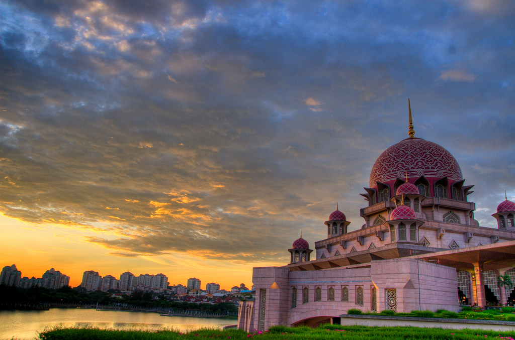 Putra Mosque